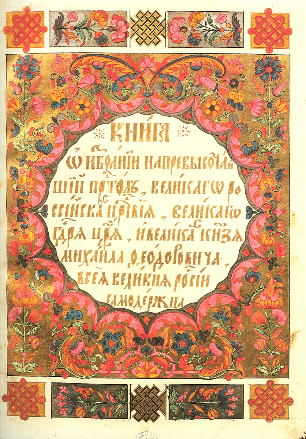 Святитель Феодорит Рязанский во главе посольства Великого Поместного и Земского Собора 1613 года призывает на Царство Михаила Феодоровича Романова